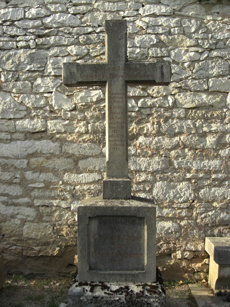 Grab des Schriftstellers und Geistlichen Karl Stöber (1796-1865) auf dem Friedhof in Pappenheim